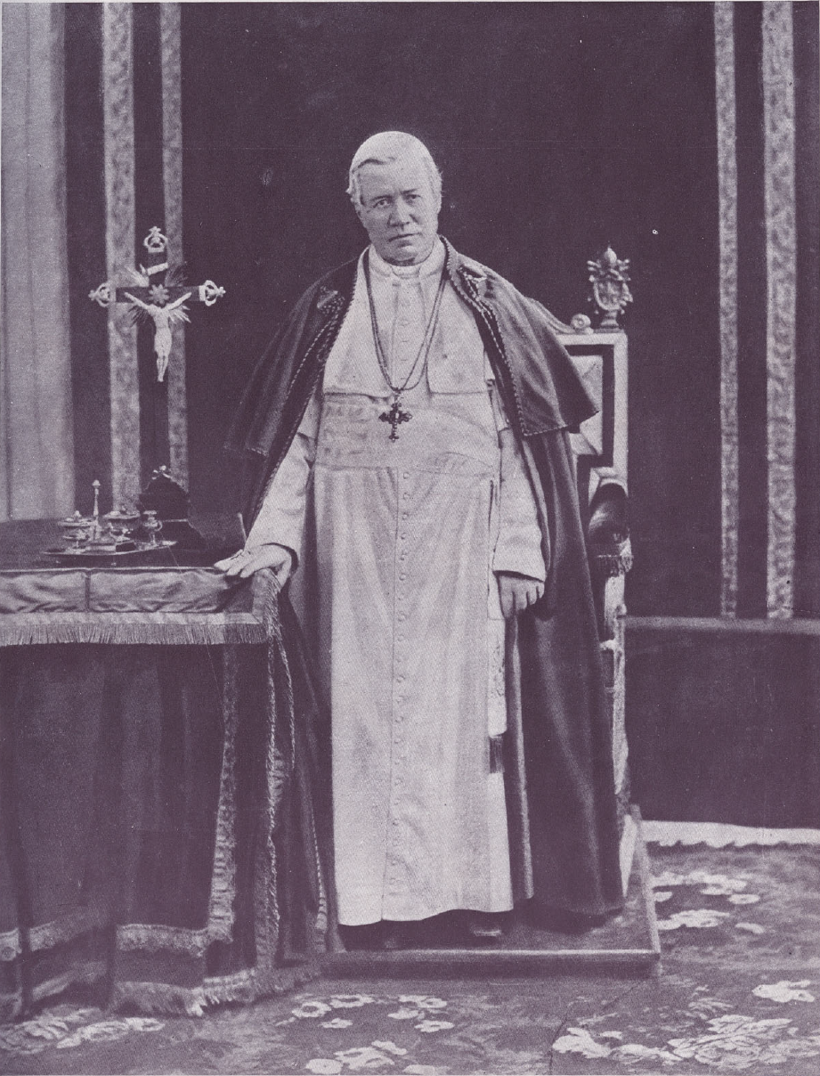 Retrato del papa Pío X publicado en 1914 con motivo de su fallecimiento